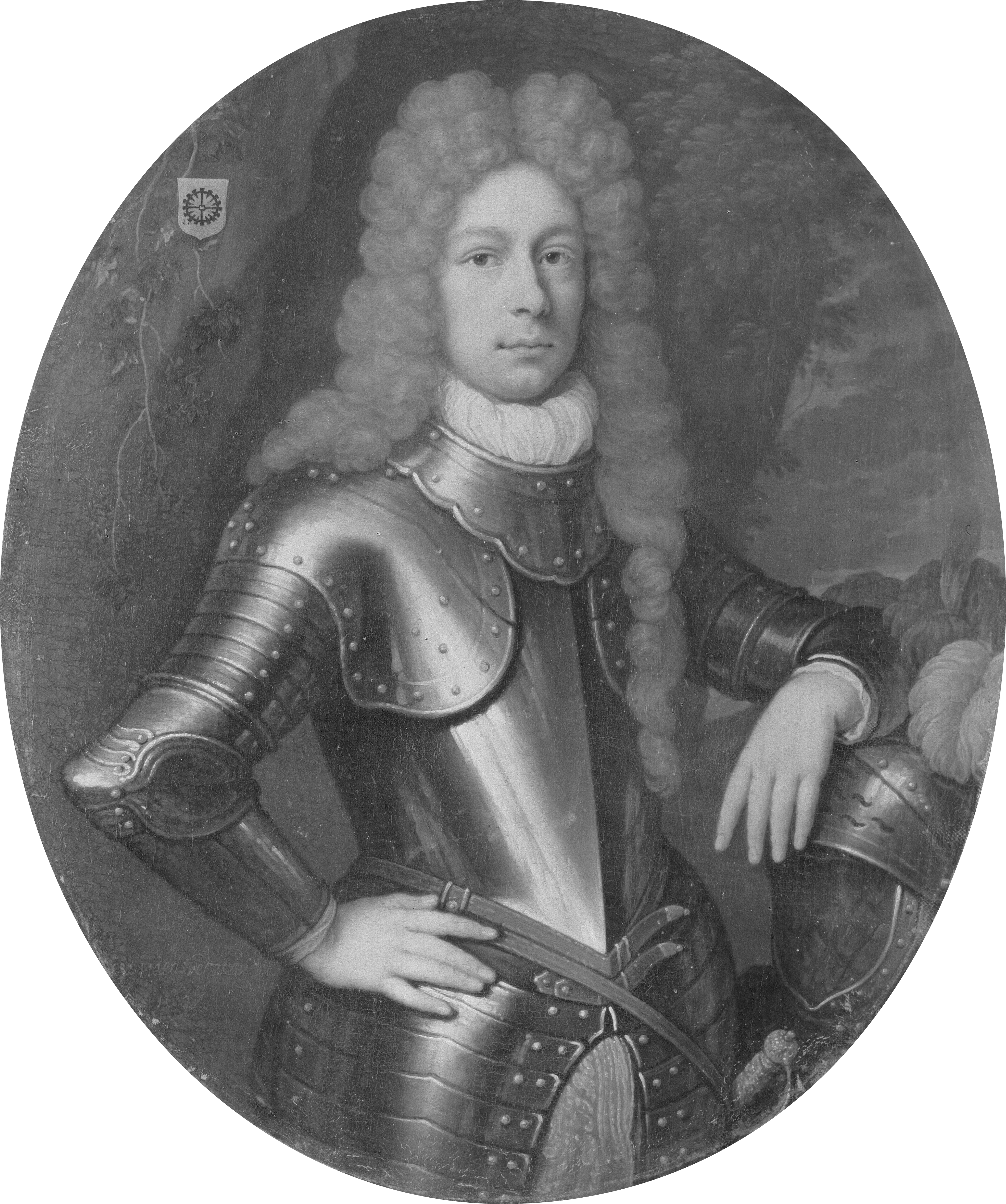 Gijsbert van Hogendorp (1668-1750)